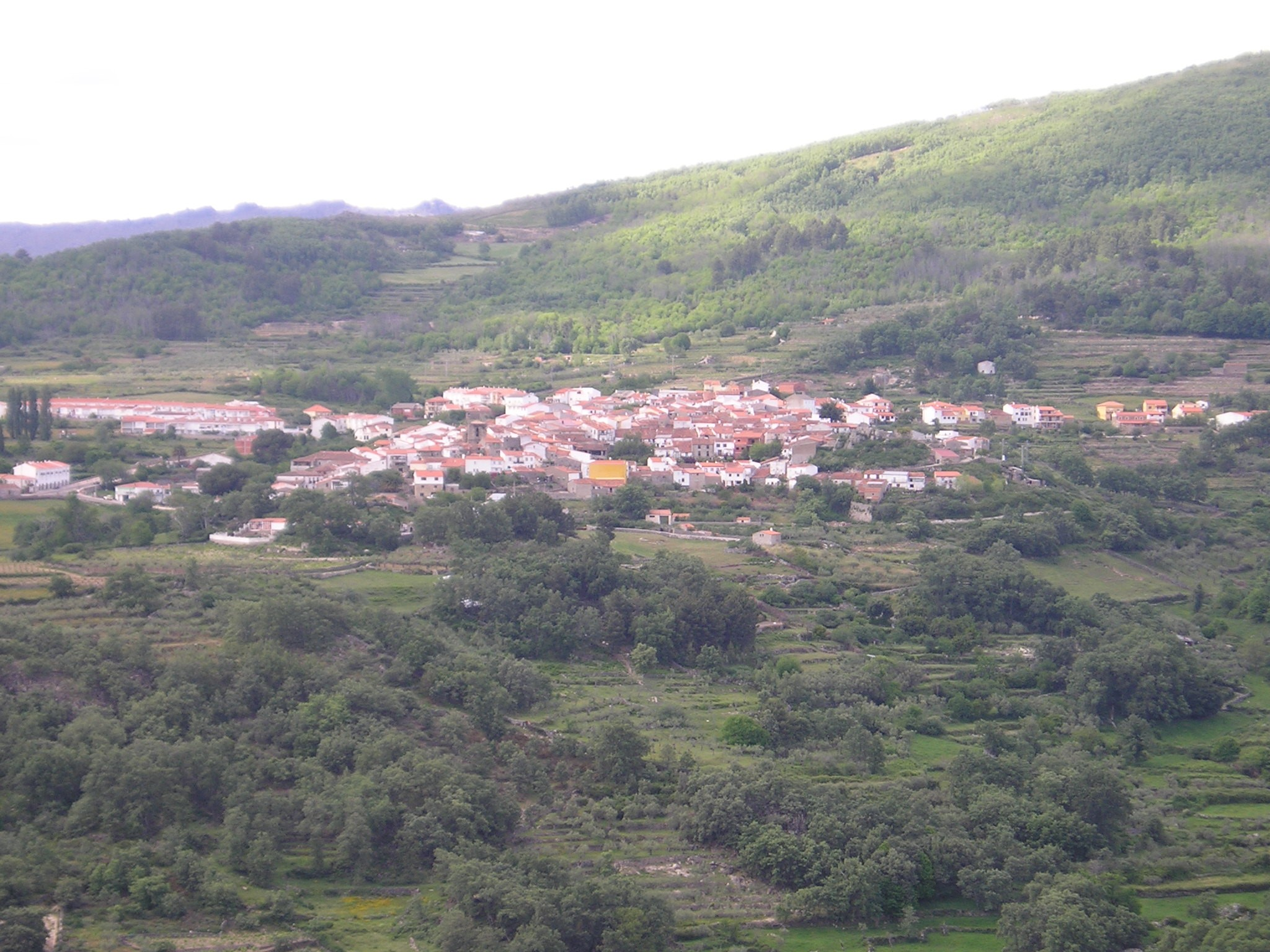 Villamieleko ikuspegi orokorra.